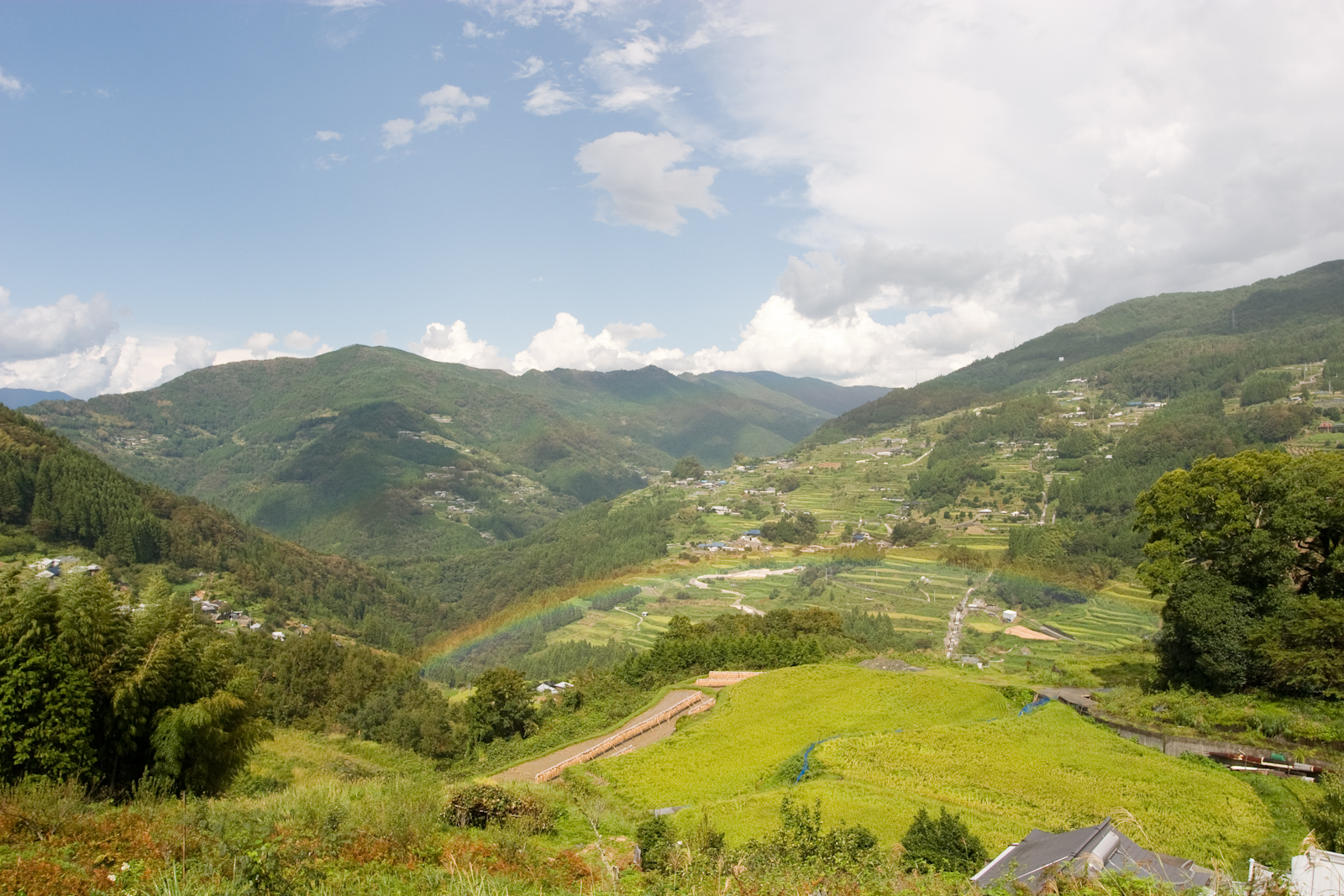 虹のある風景